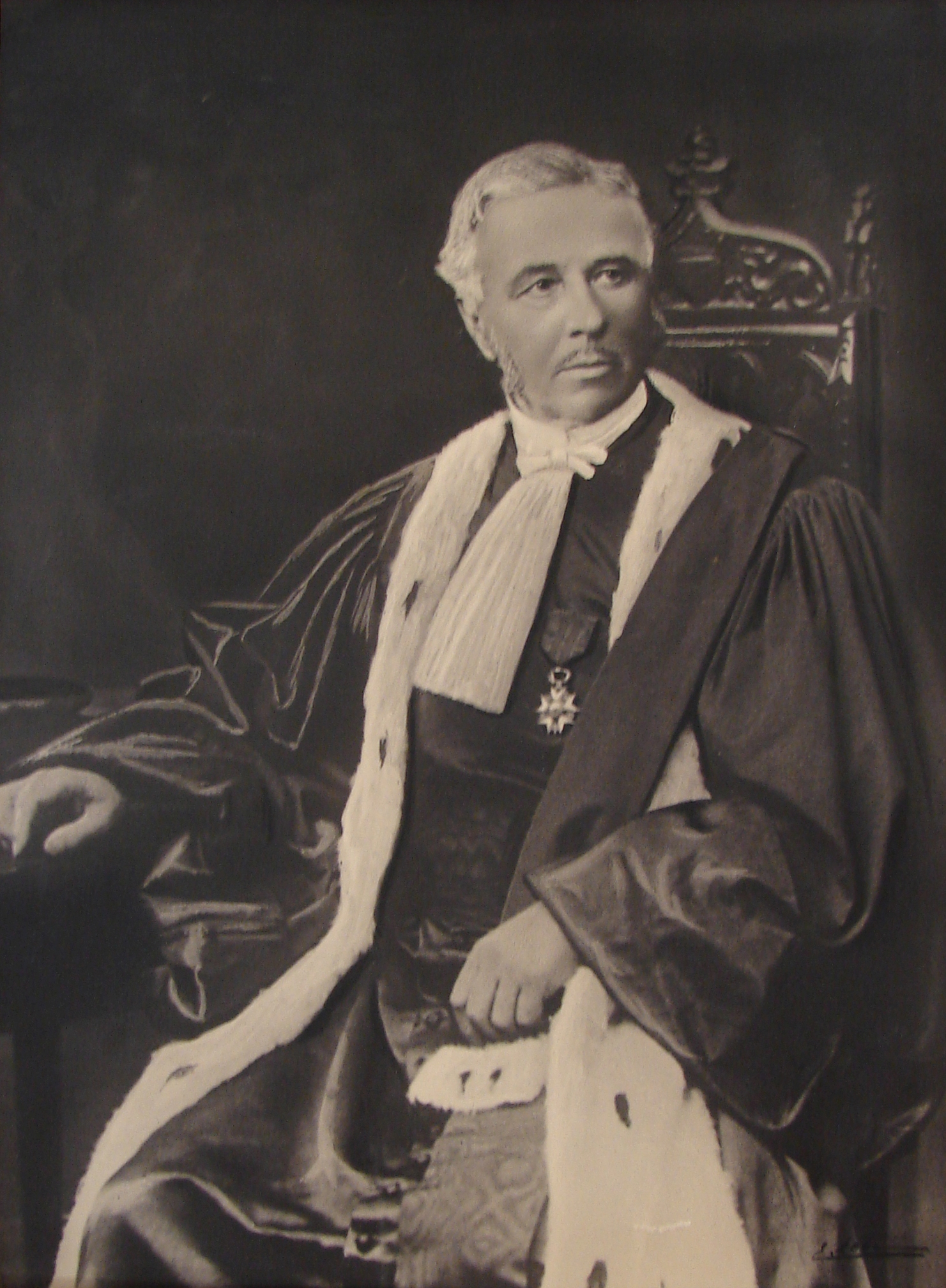 Portrait de Charles Jac, premier président de la Cour d'appel d'Angers (1876-1883)